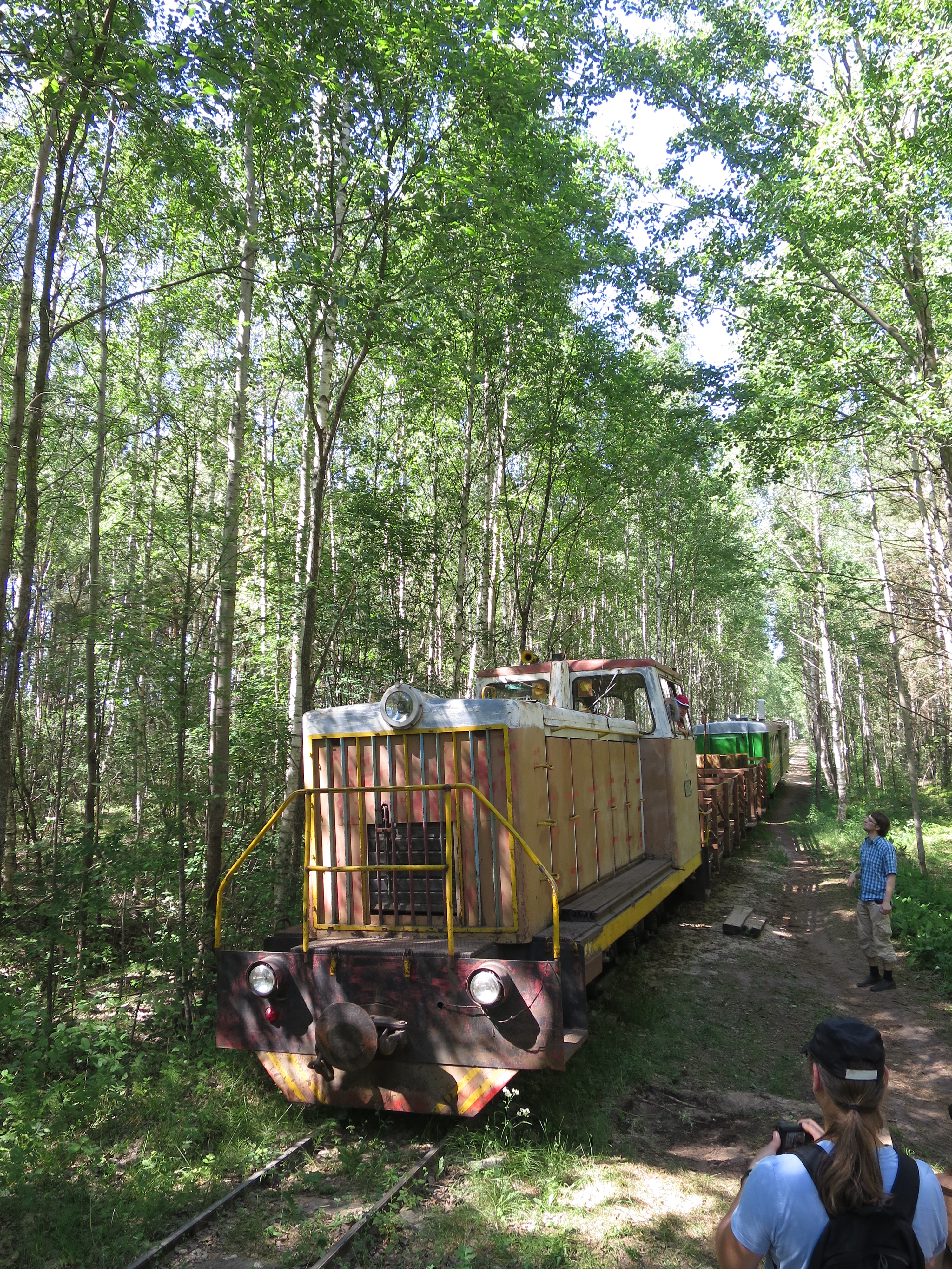 Baložu kūdras muzejdzelzceļš